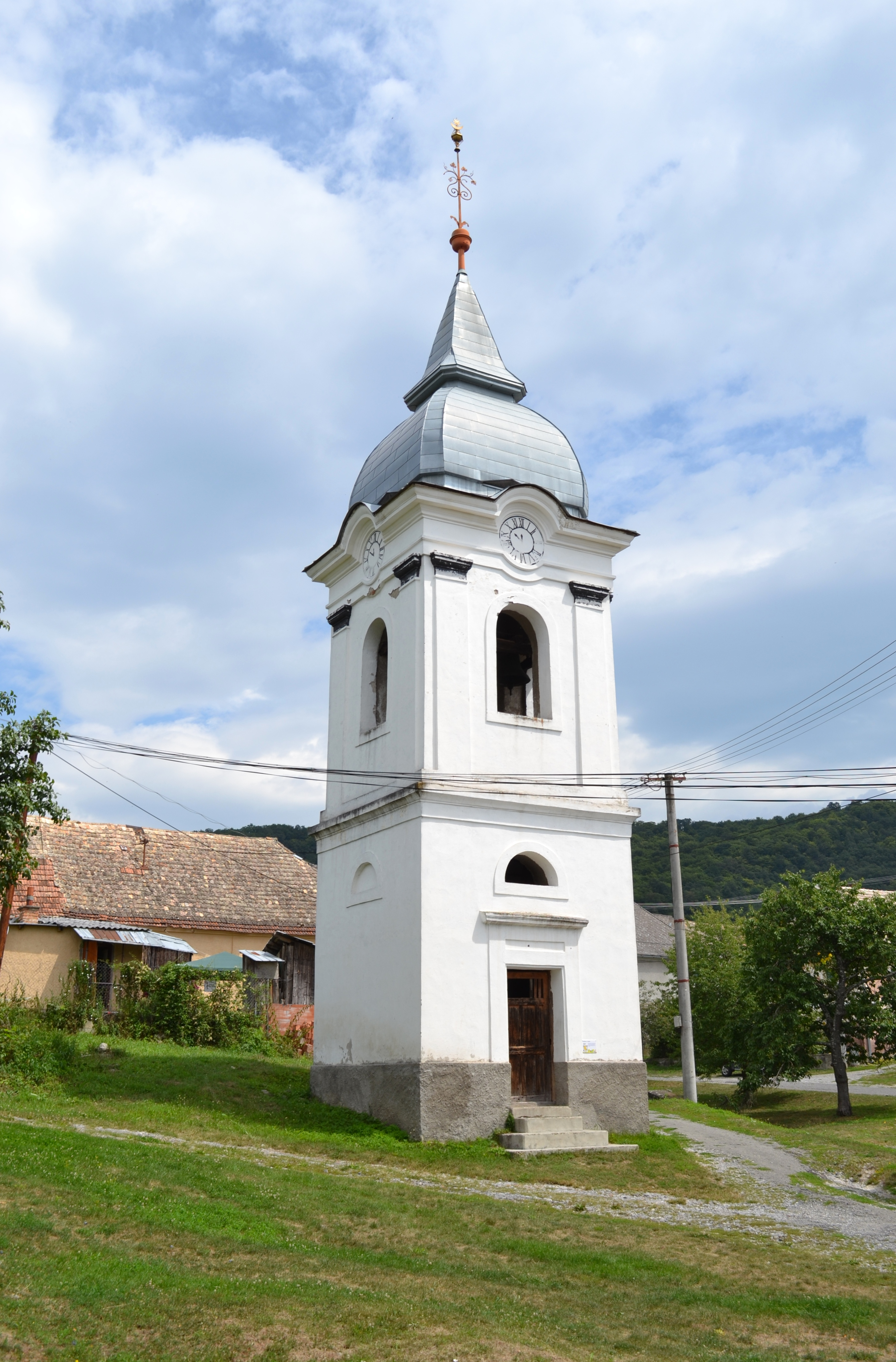 Zvonica v Hostišovciach